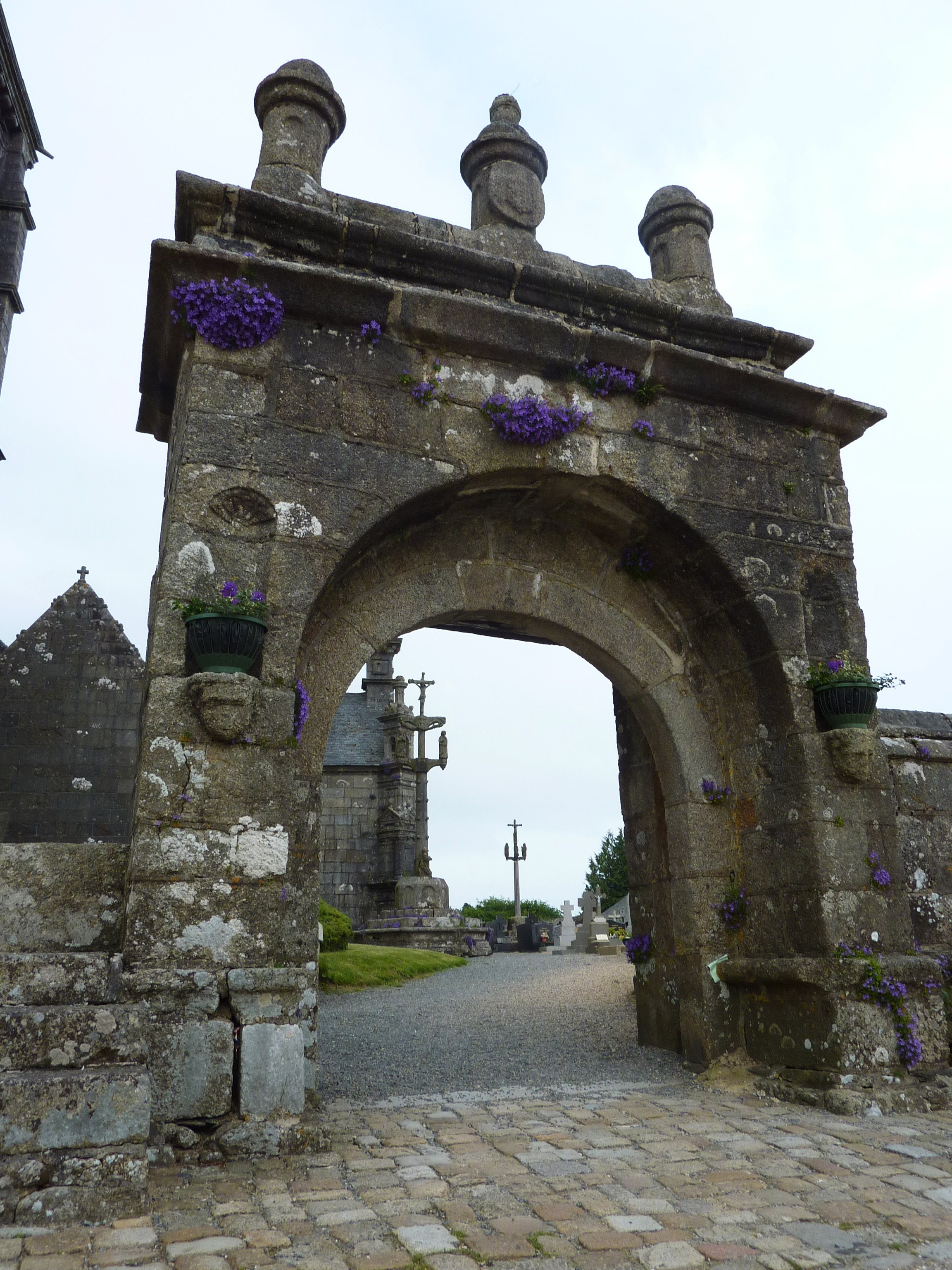 Arc de triomphe de Commana (XVIIIème siècle)